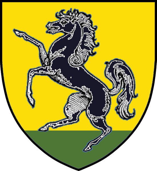 Vapensköld för svenska adelsätten Rappe